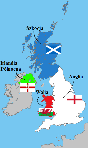 Mapa zawierająca pokolorowane i podpisane "Home Nations" oraz ich flagi